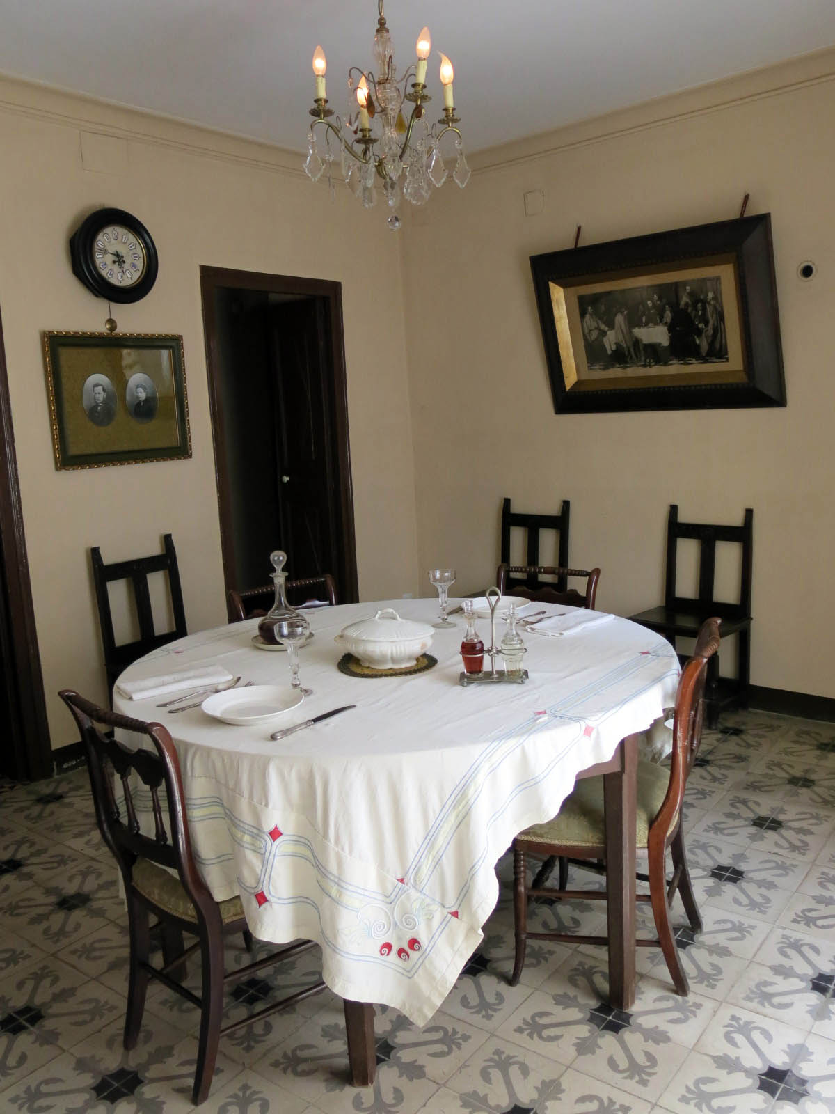 Casa Prat de la Riba (Castellterçol) Object location41° 45′ 05.38″ N, 2° 07′ 10.01″ E